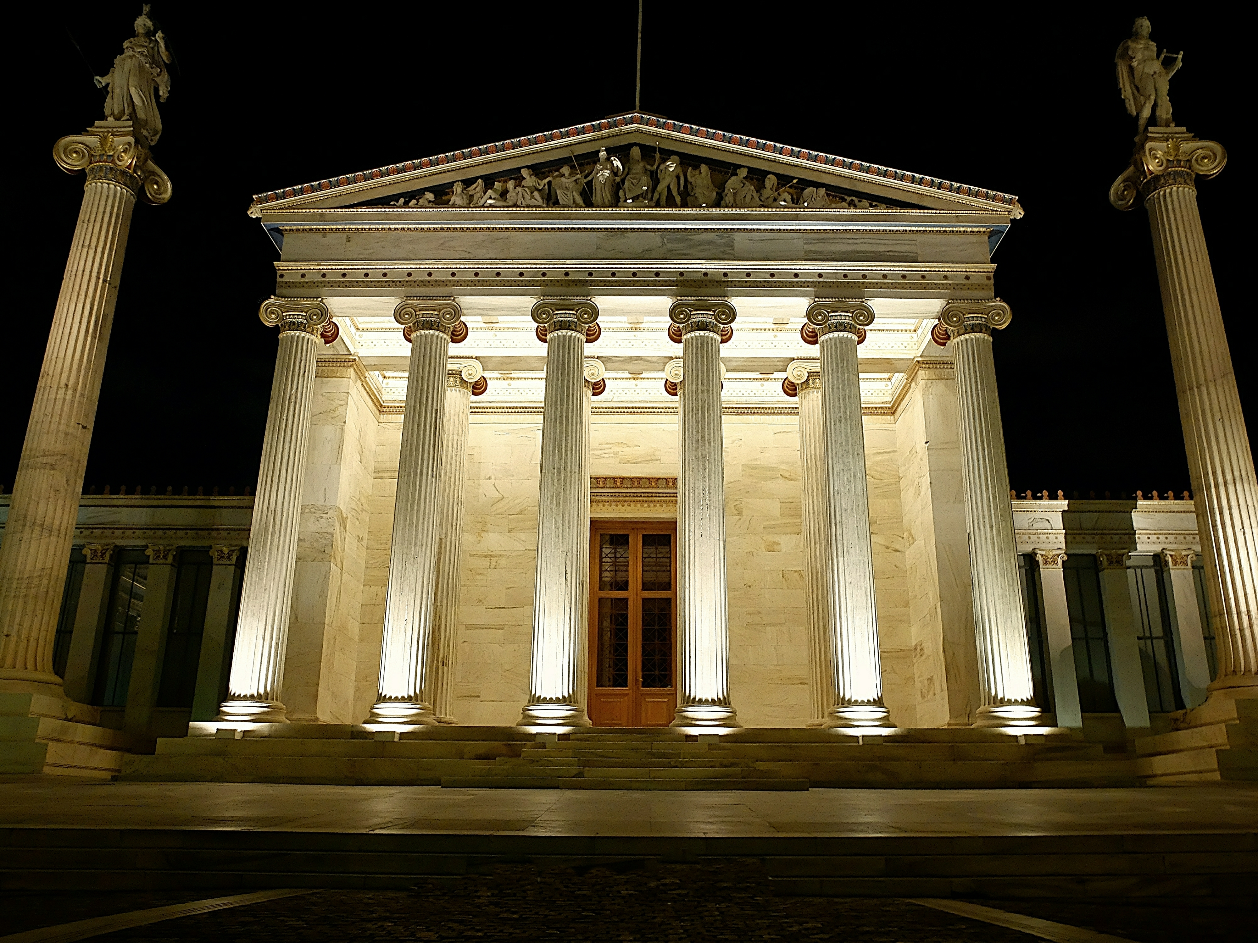 «Μέγαρο Ακαδημίας Αθηνών»